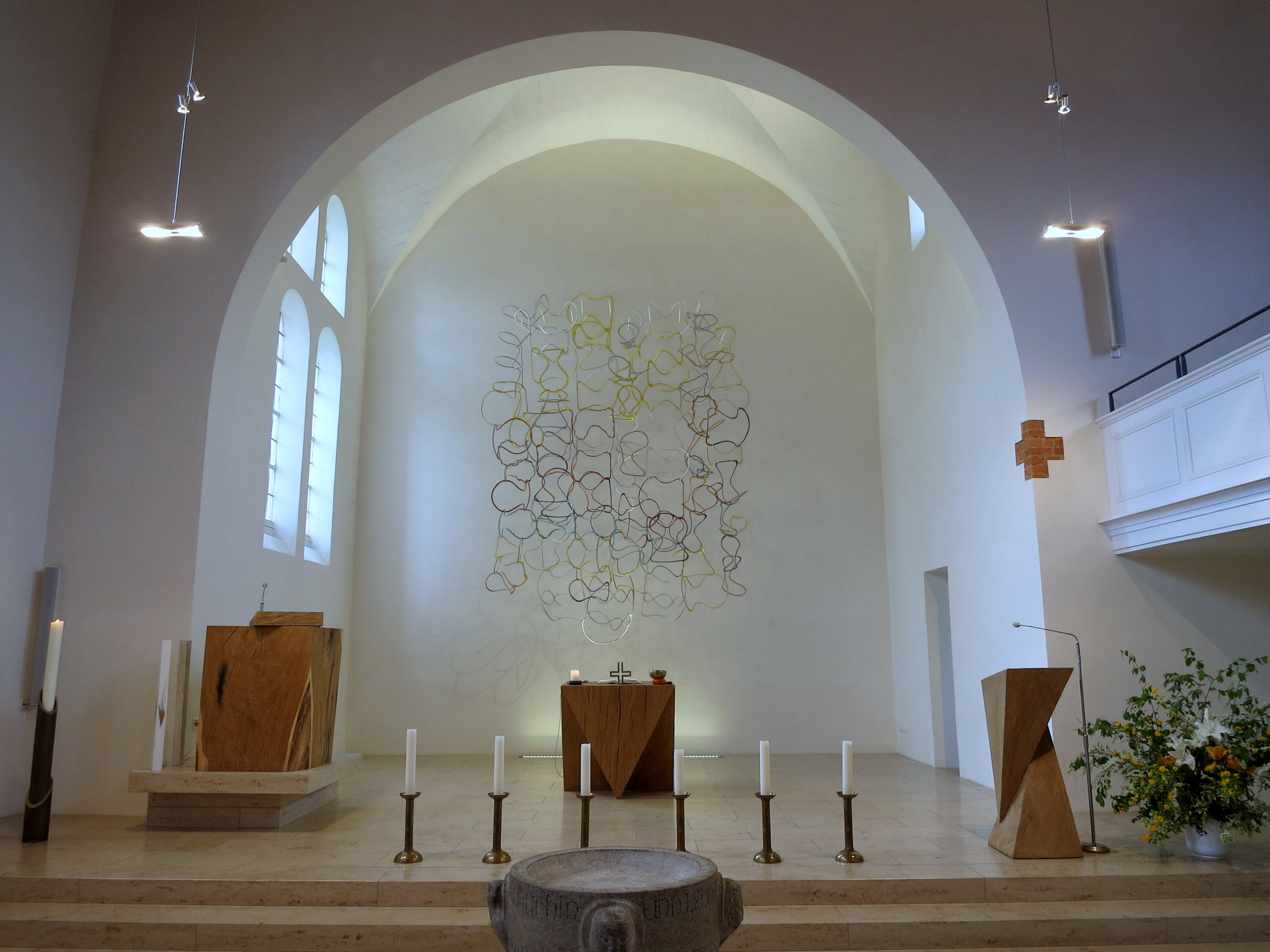 Das neue Innere der Kirche